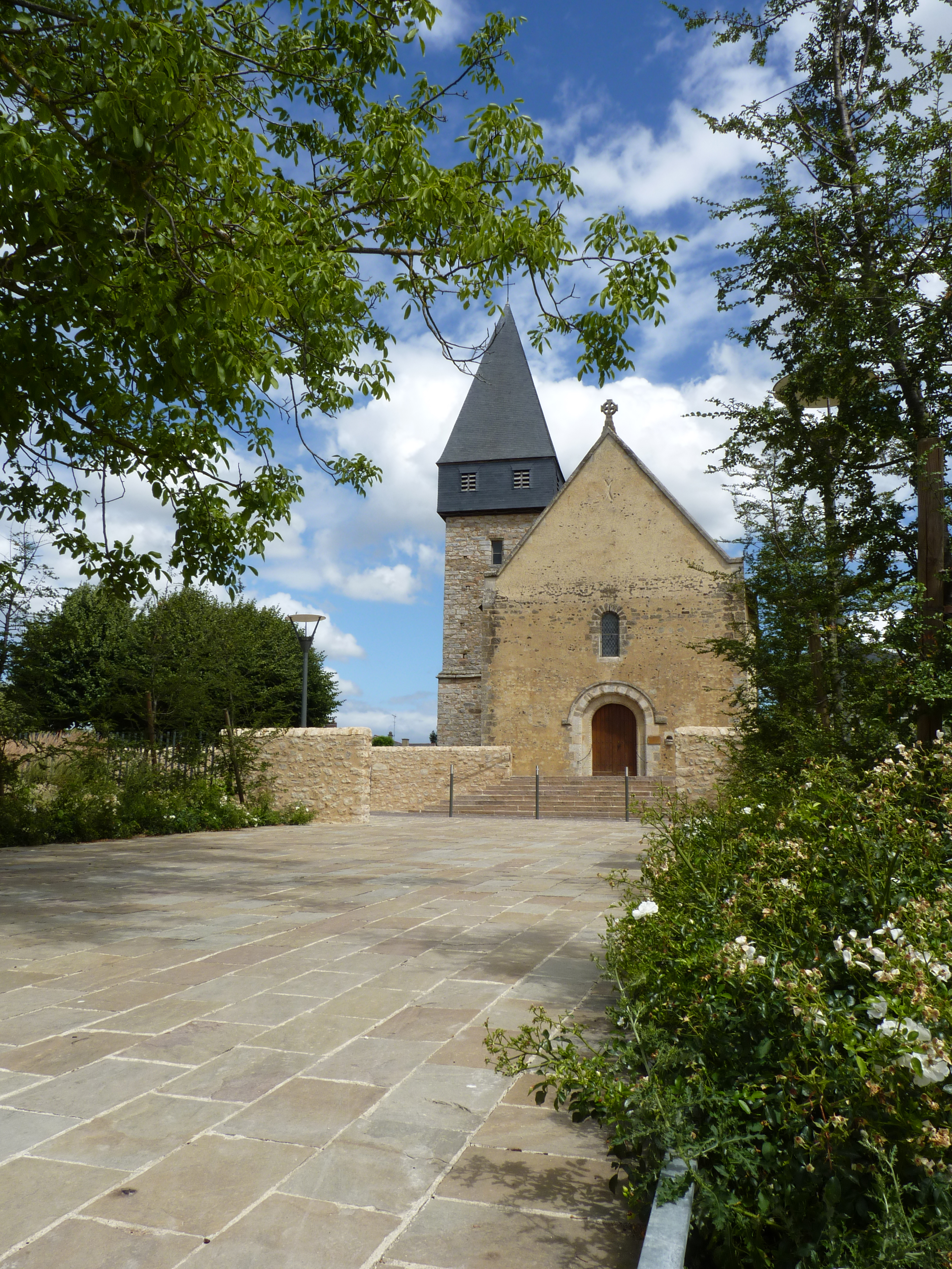 Sarthe - Coulaines - Eglise Saint Nicolas